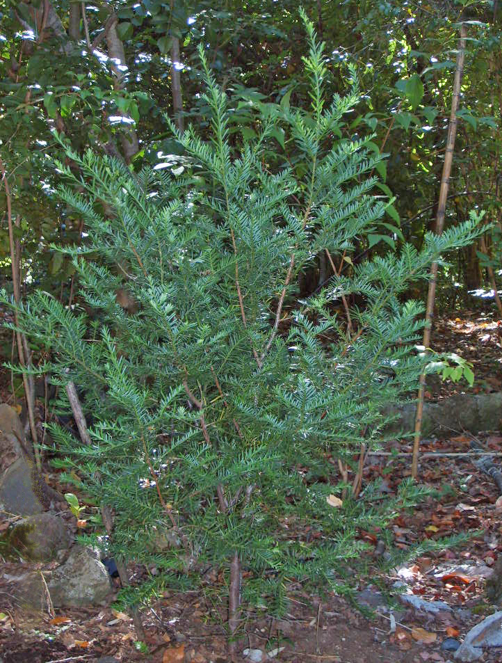 Lleque, Prumnopitys andina.